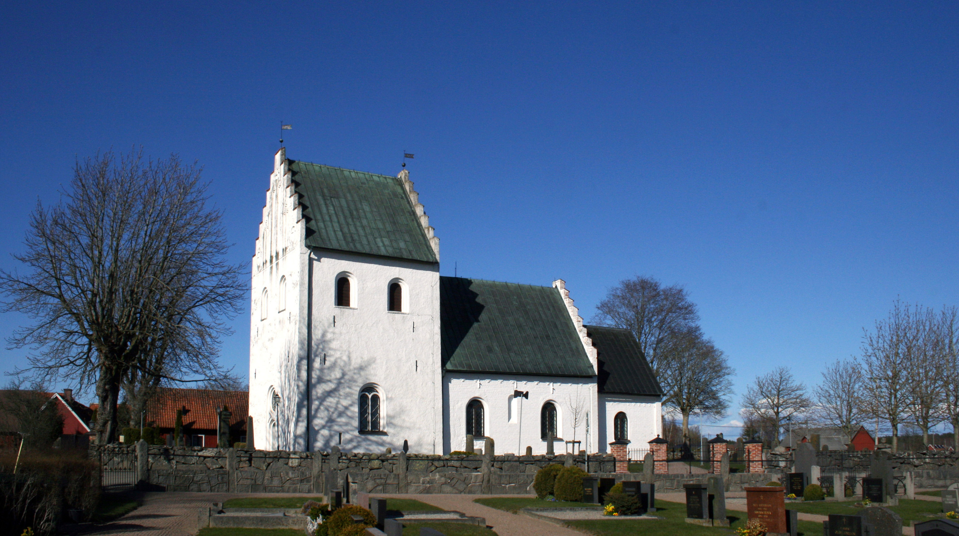 Emmislövs kyrka i Emmislöv, Östra Göinge kommun, Skåne